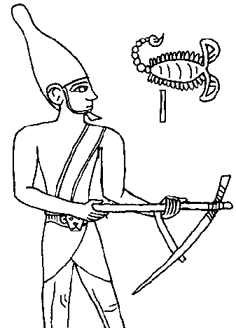 Skorpion II.